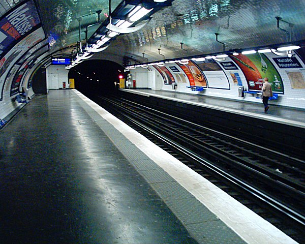 Quais de la station Marcadet du Métropolitain de Paris.